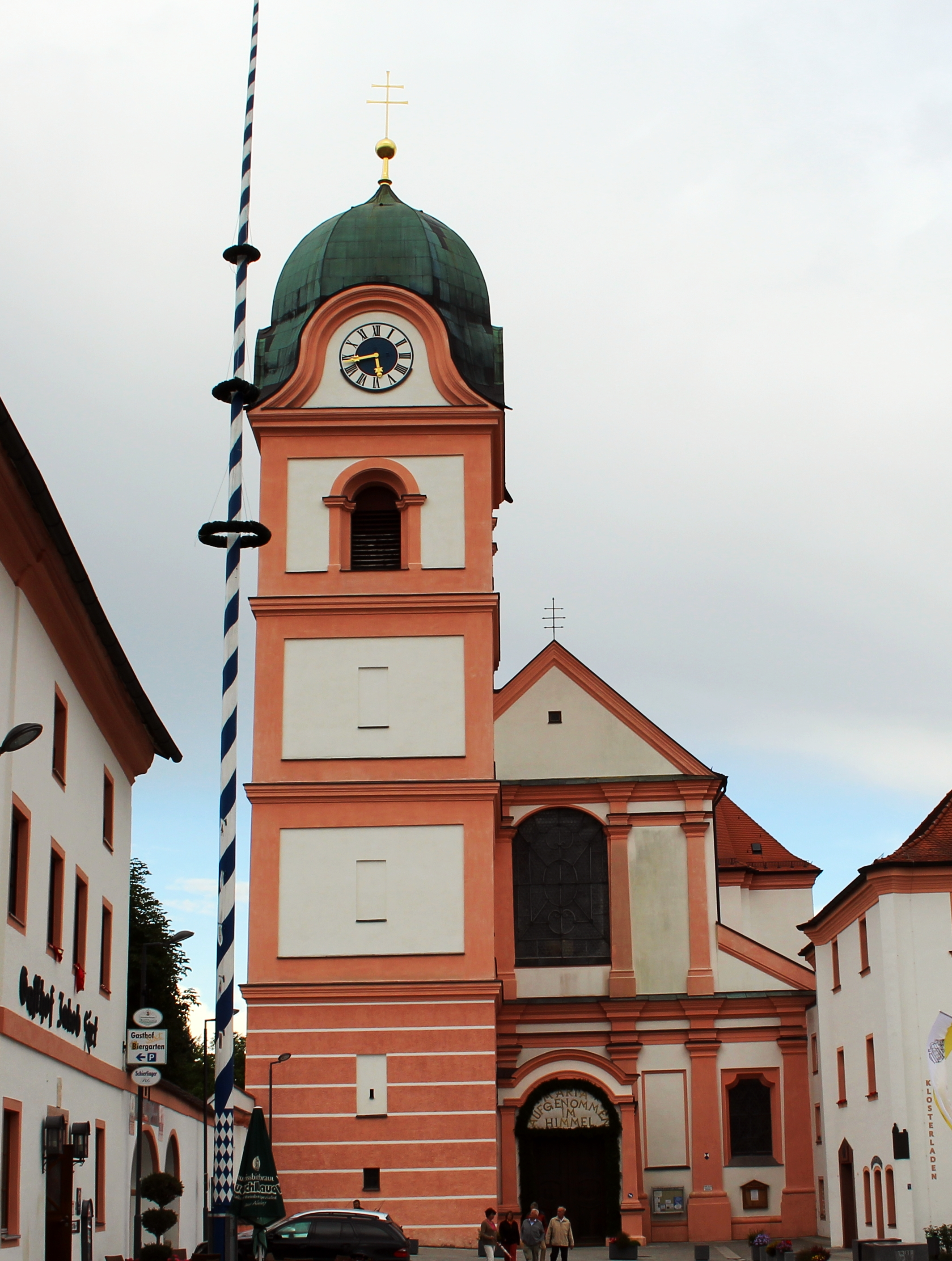 Abteikirche Mariä Himmelfahrt in Rohr, Landkreis Kelheim, Niederbayern